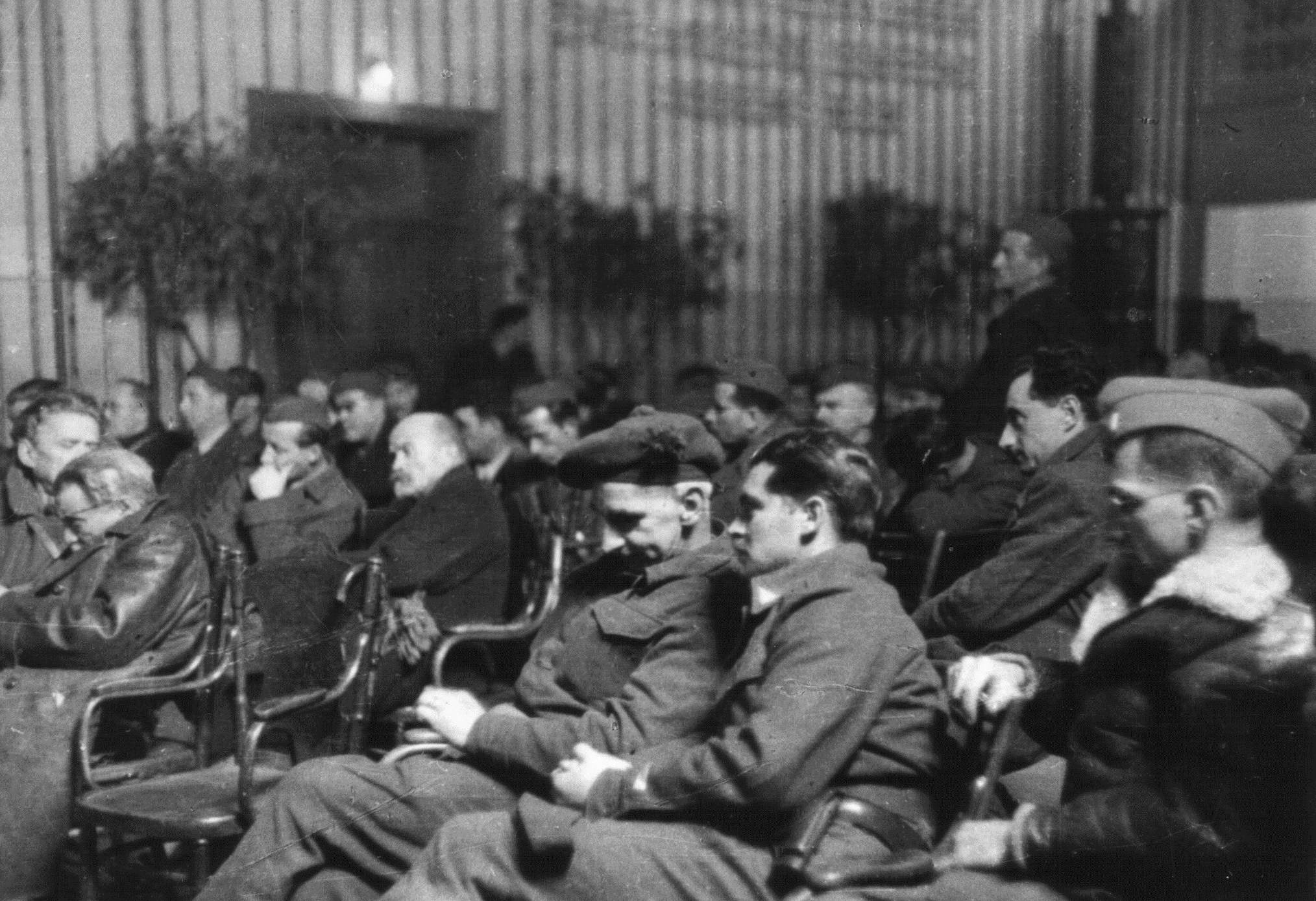 Prvo zasedanje Slovenskega narodnoosvobodilnega sveta (SNOOS) v Črnomlju. Skrajno levo : Moša Pijade in Ivan Ribar.